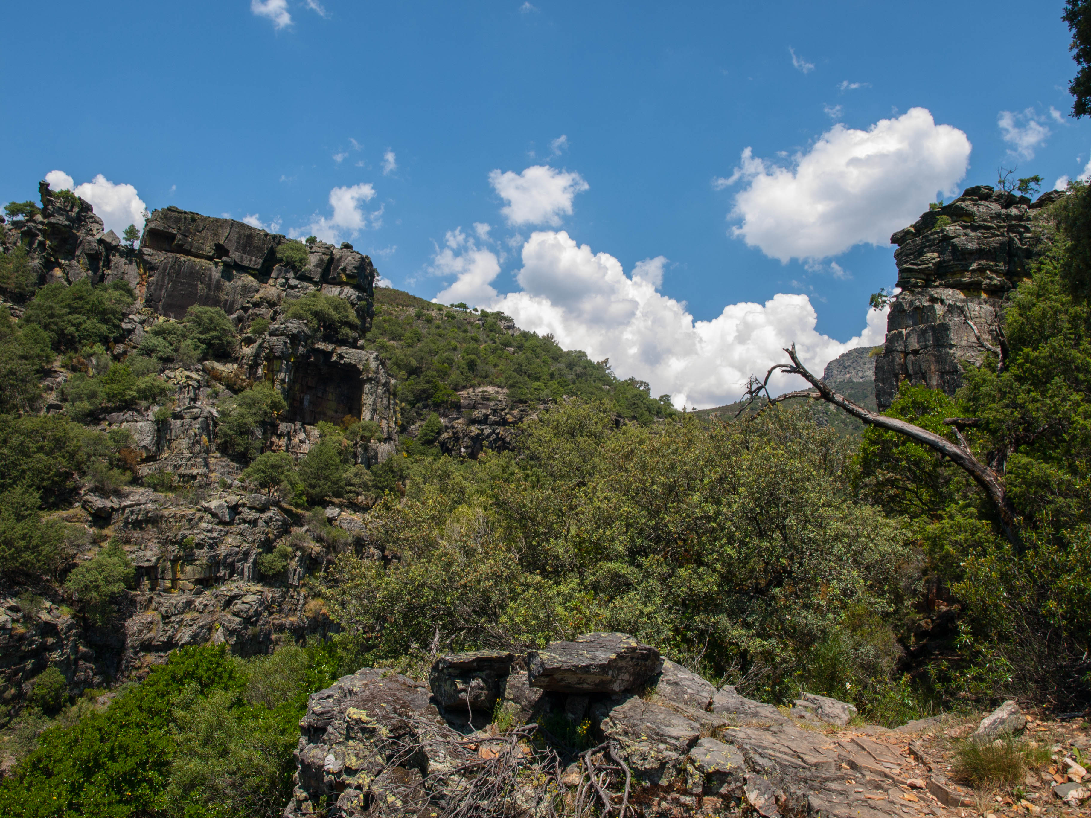 Camino de El Chorro